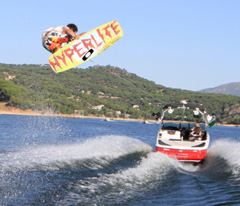 Jaime martinez rascasens